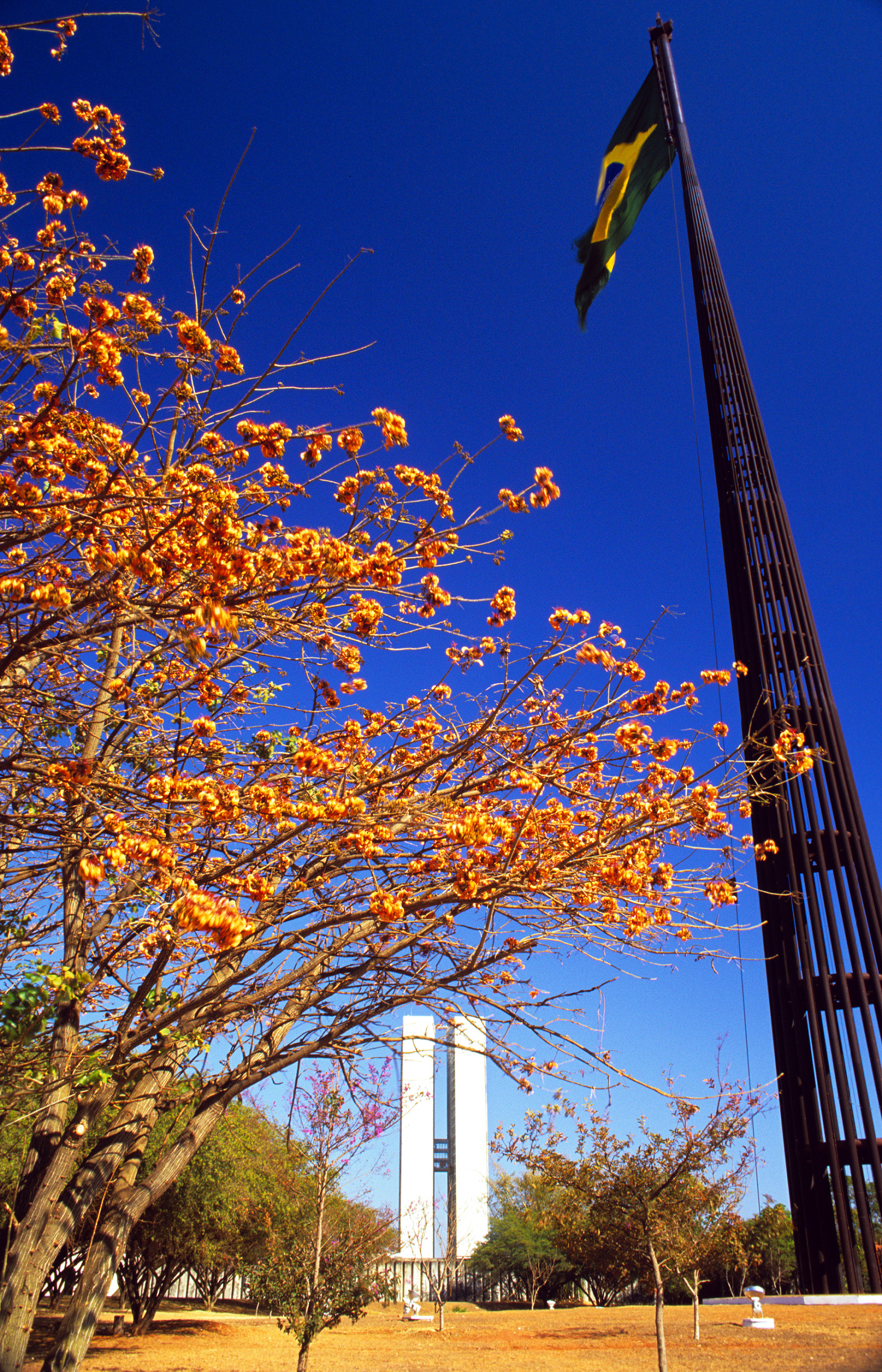 O mastro da bandeira do Brasil na praça dos Três Poderes em Brasília.